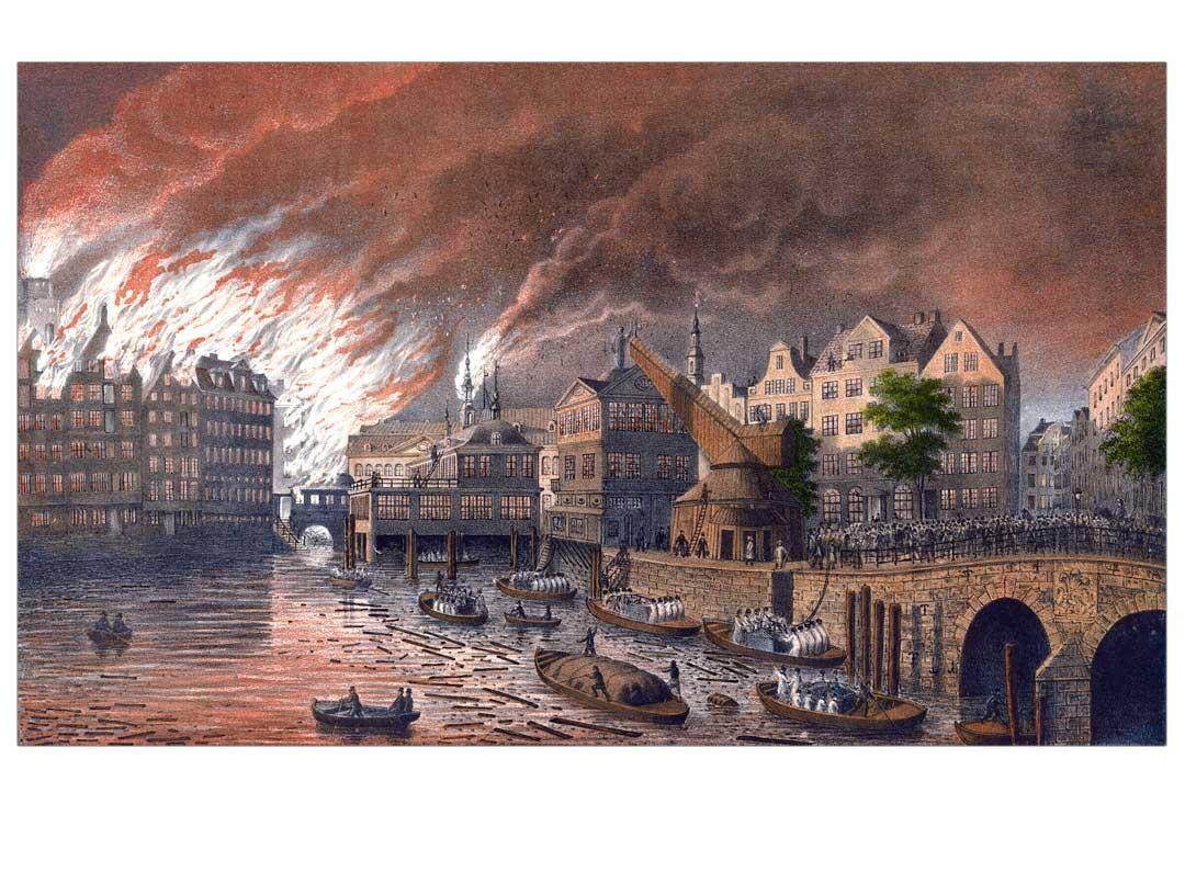 Bild des Hamburger Brandes von 1842.